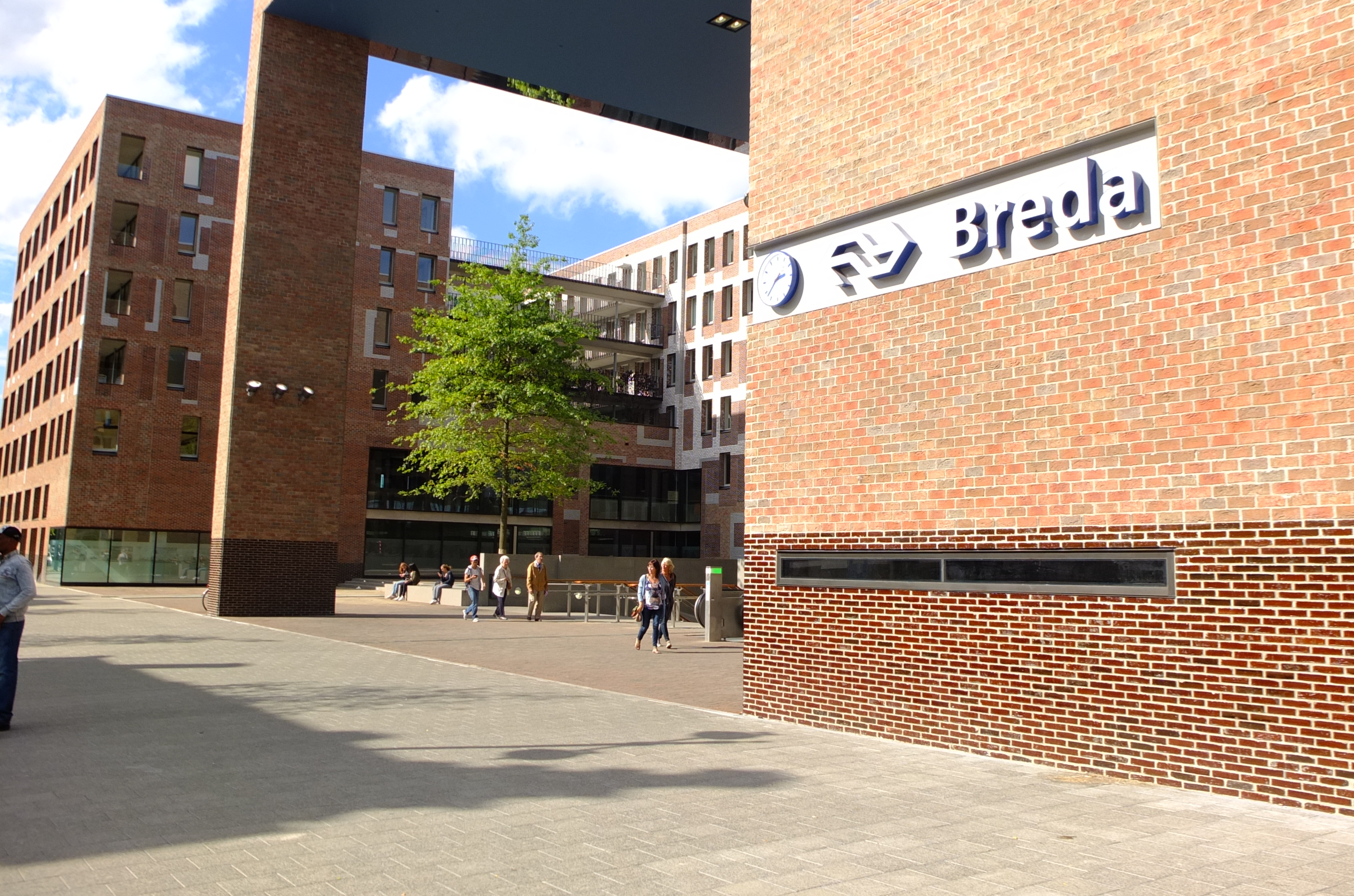 Nieuwe Station Breda